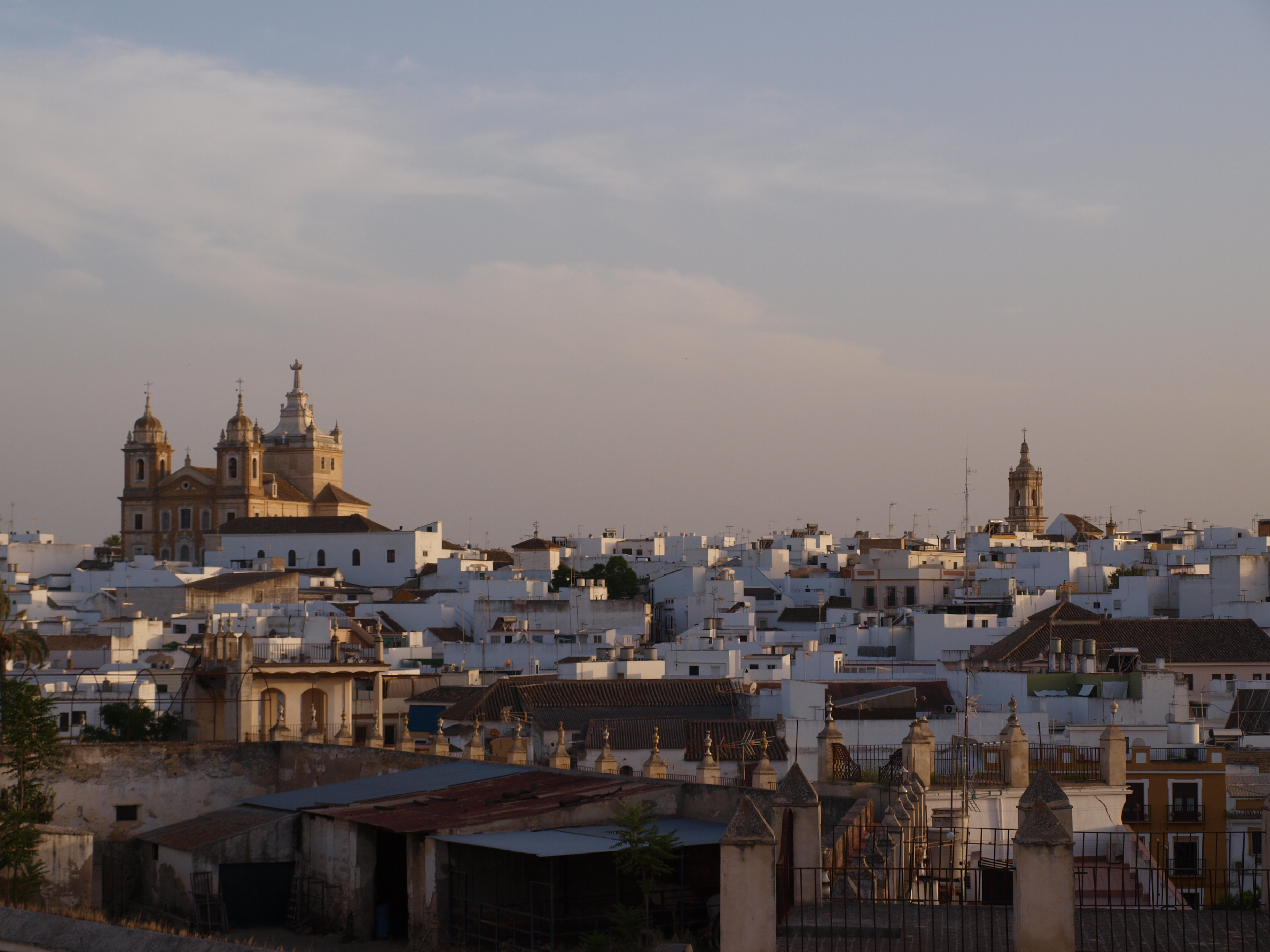 Vista de Marchena